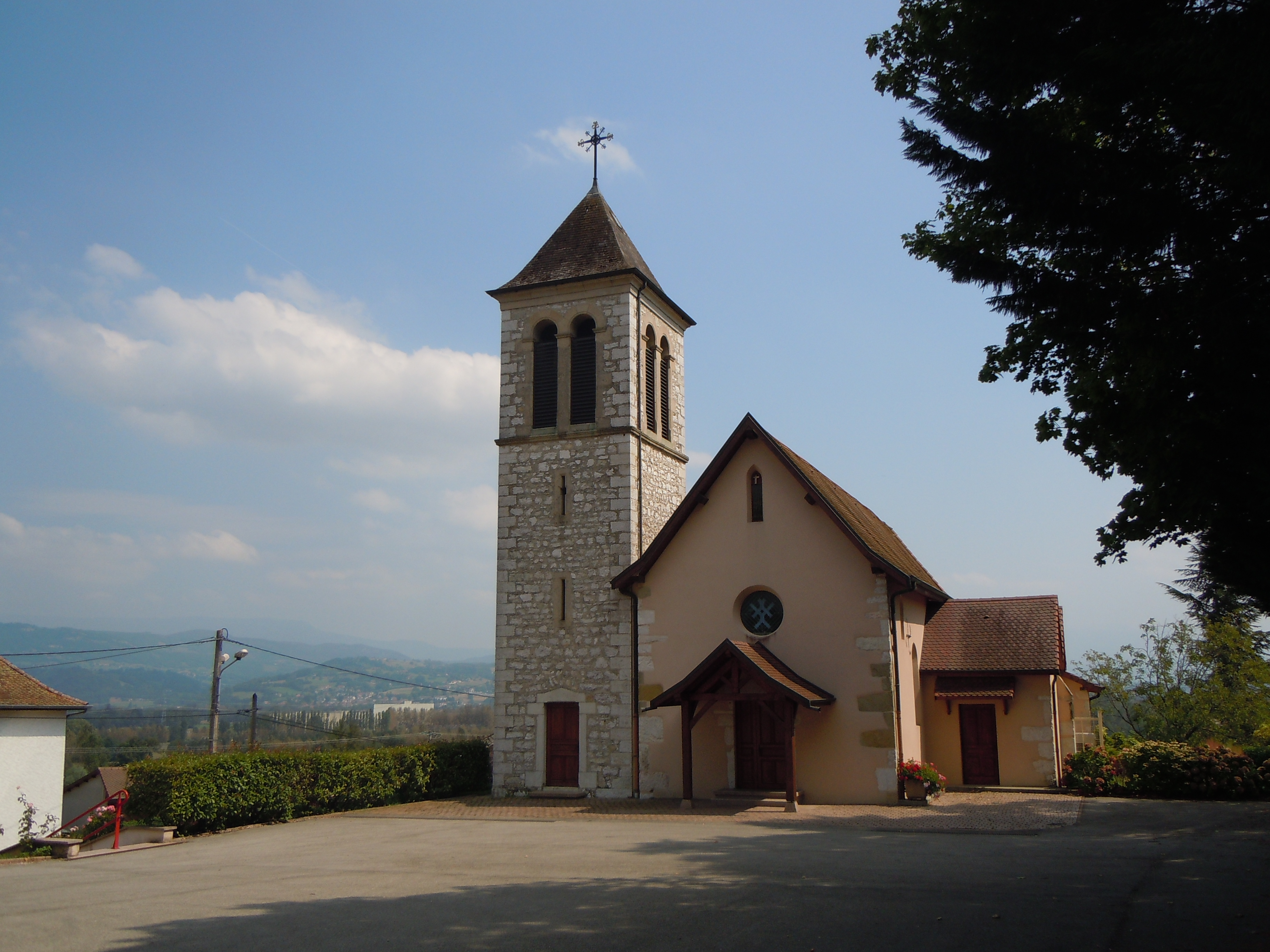 Eglise de Granieu - Isère